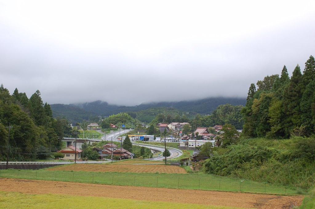 採用。台風接近中。